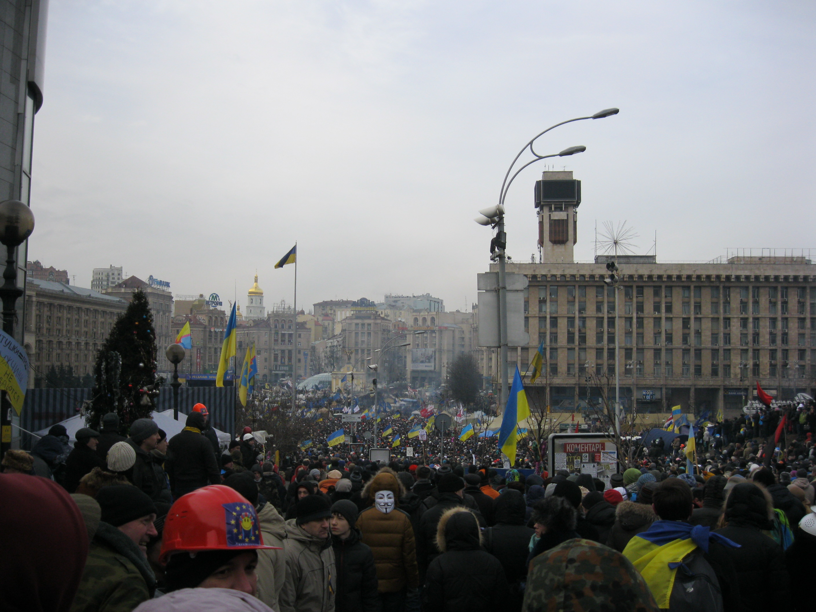 Євромайдан